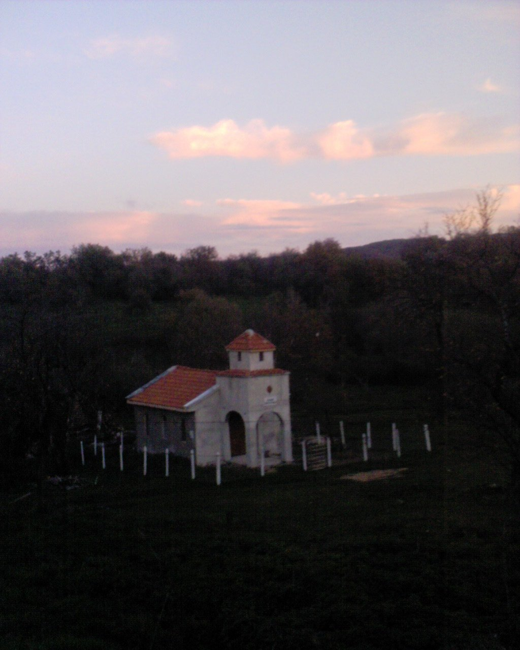 Храмът в село Белеврен, България